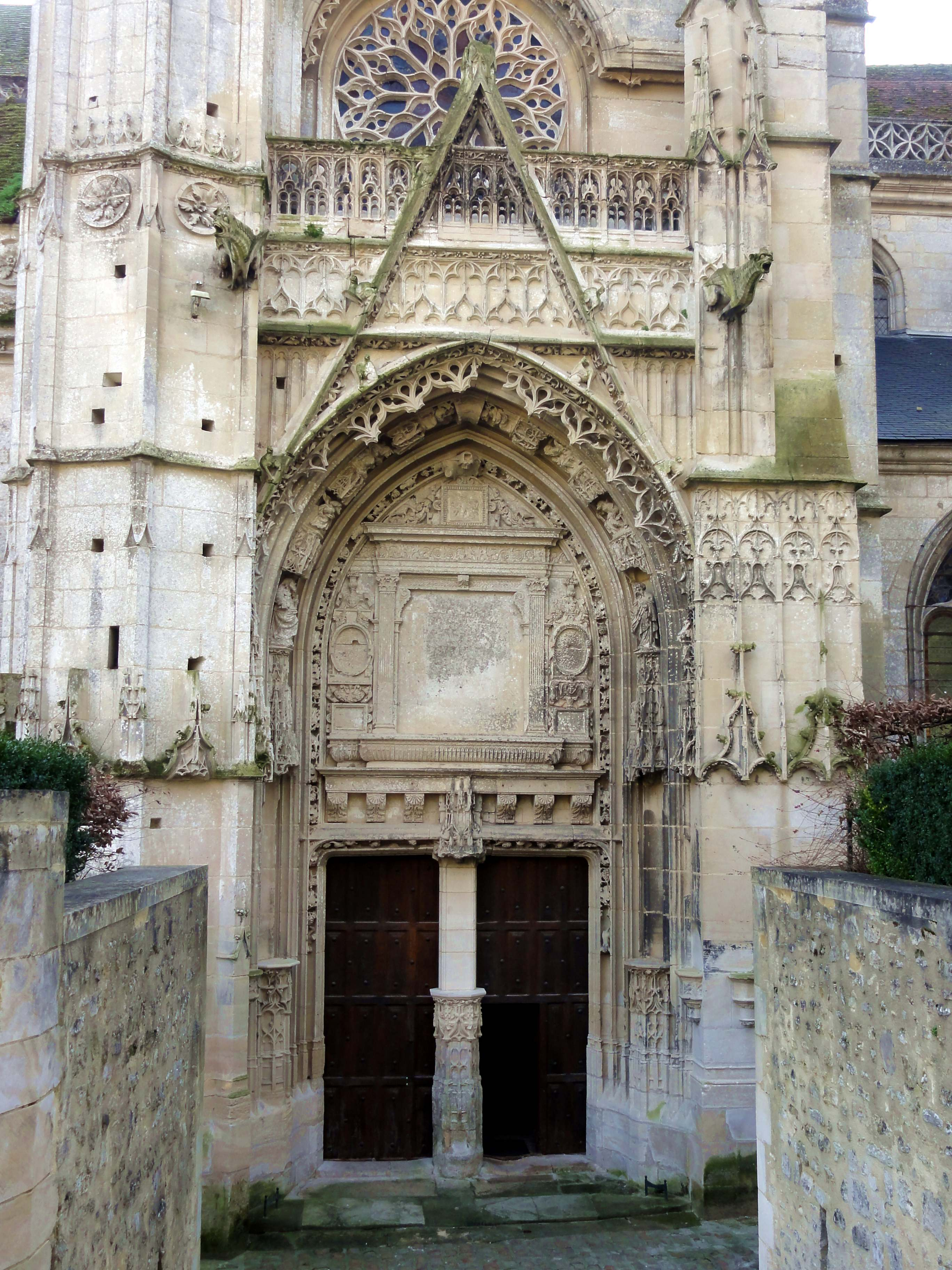 Église Saint-Jean-Baptiste de Chaumont-en-Vexin - voir titre.